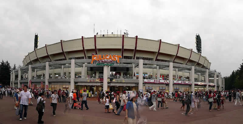 2005年3月に完成した第一期のフルキャストスタジアム宮城。 撮影日は2005年9月11日(東北楽天対福岡ソフトバンク)。 投稿者により撮影。 2005年9月15日 (木) 12:57 . . Gomurafuji . . 800×409 (43,064 バイト)